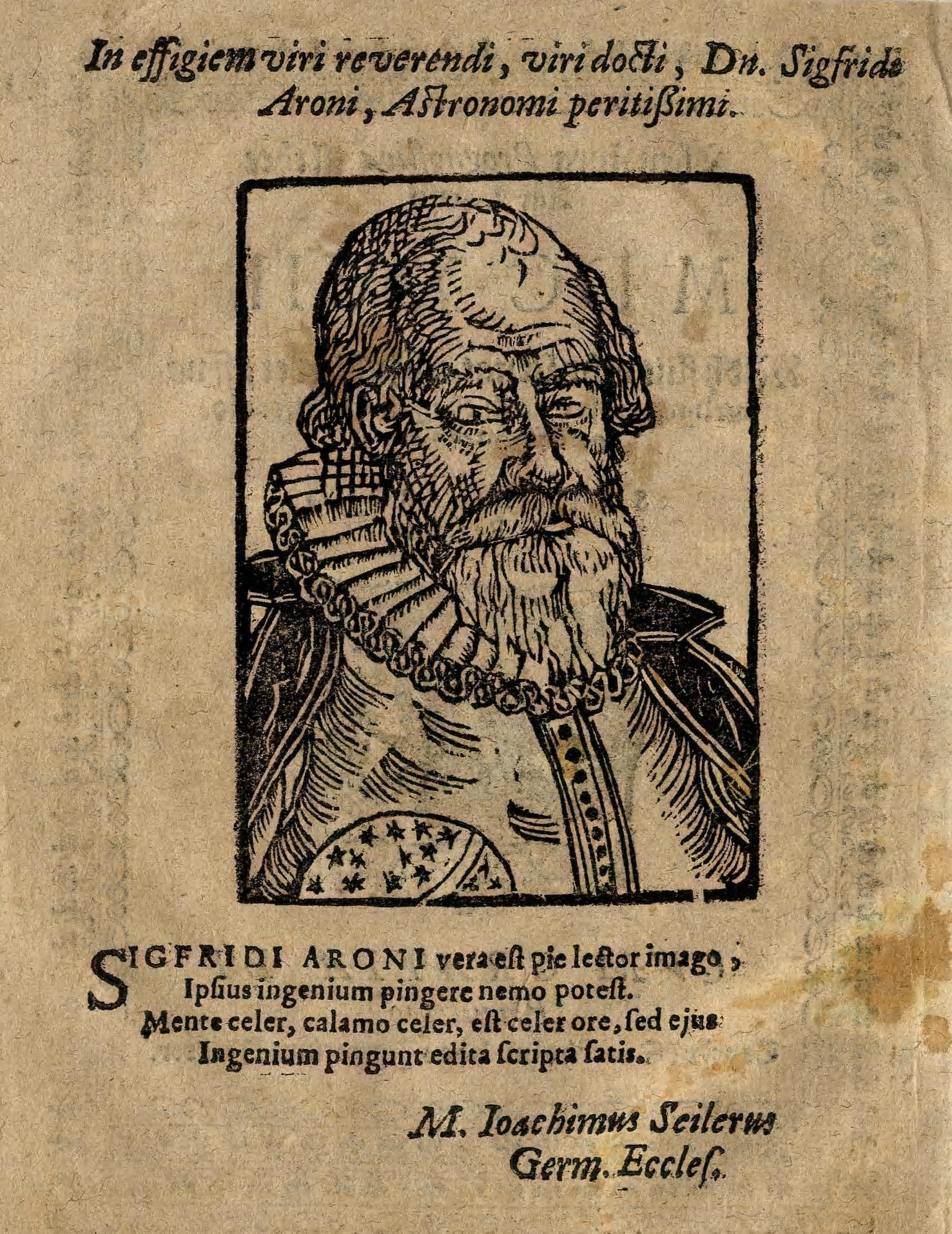 Författarporträtt i Forsius Then stora Prognostica för år 1617. Epigrammet av Joakim Seiler, pastor i Tyska kyrkan i Stockholm lyder i svensk översättning: Avbild av den vördnadsvärde och lärde mannen herr Sigfrid Aron, skickligast av astronomer. Detta är, fromme läsare, Sigfrid Arons sanna porträtt. Teckna hans geni kan ingen. Snabb i tanken, kvick med pennan, munvig är han, men hans skarpsinne tecknas tillräckligt av hans utgivna skrifter.